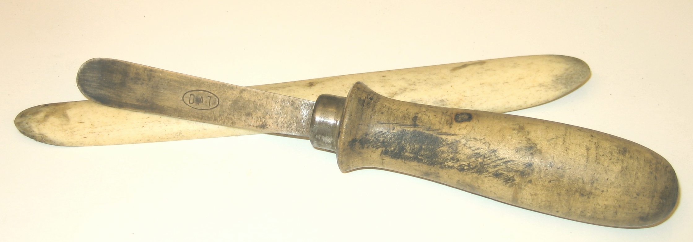 Outils de bottier soource familiale / photo Dominique grassigli